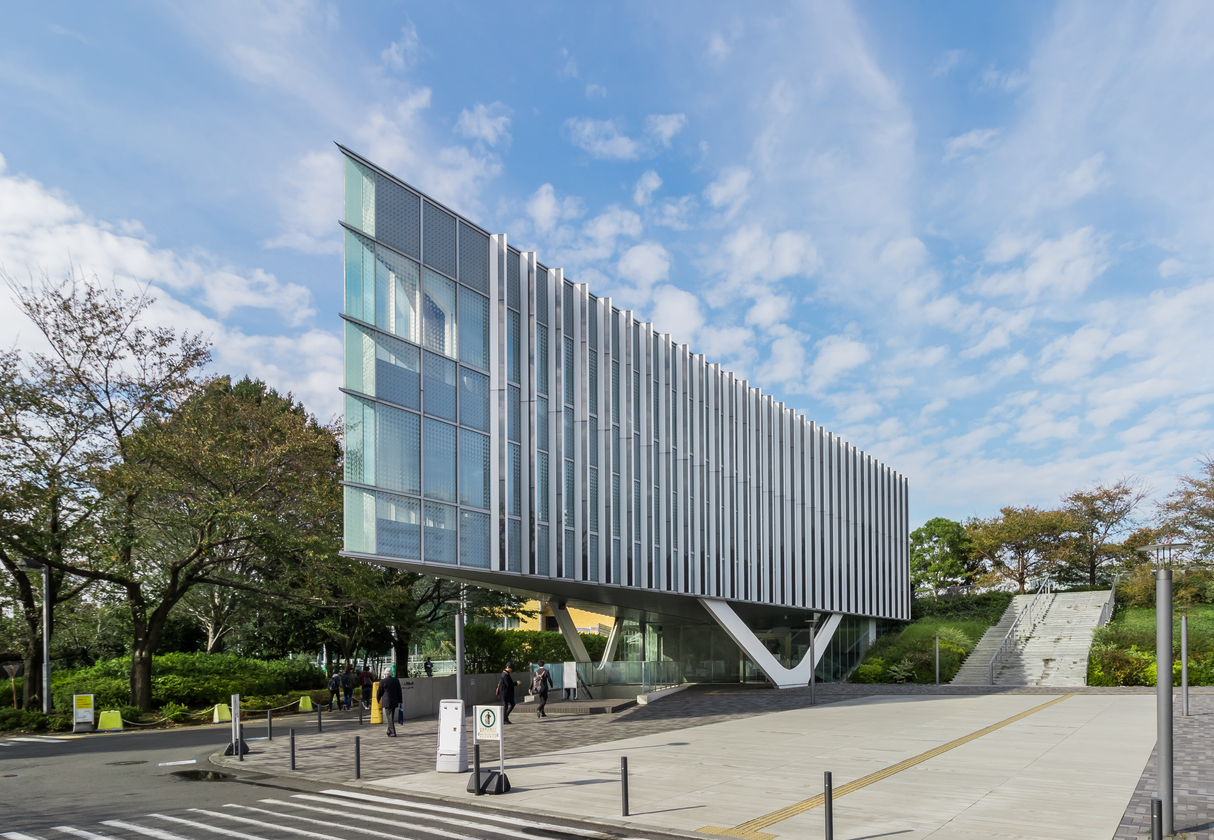 東京工業大学 大岡山キャンパス付属図書館。安田幸一研究室＋佐藤総合計画設計(2011)。BCS賞受賞(2013)。